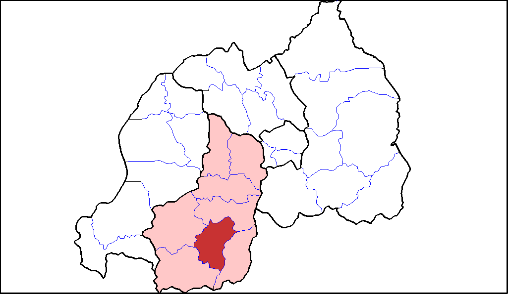 Distretto di Huye.